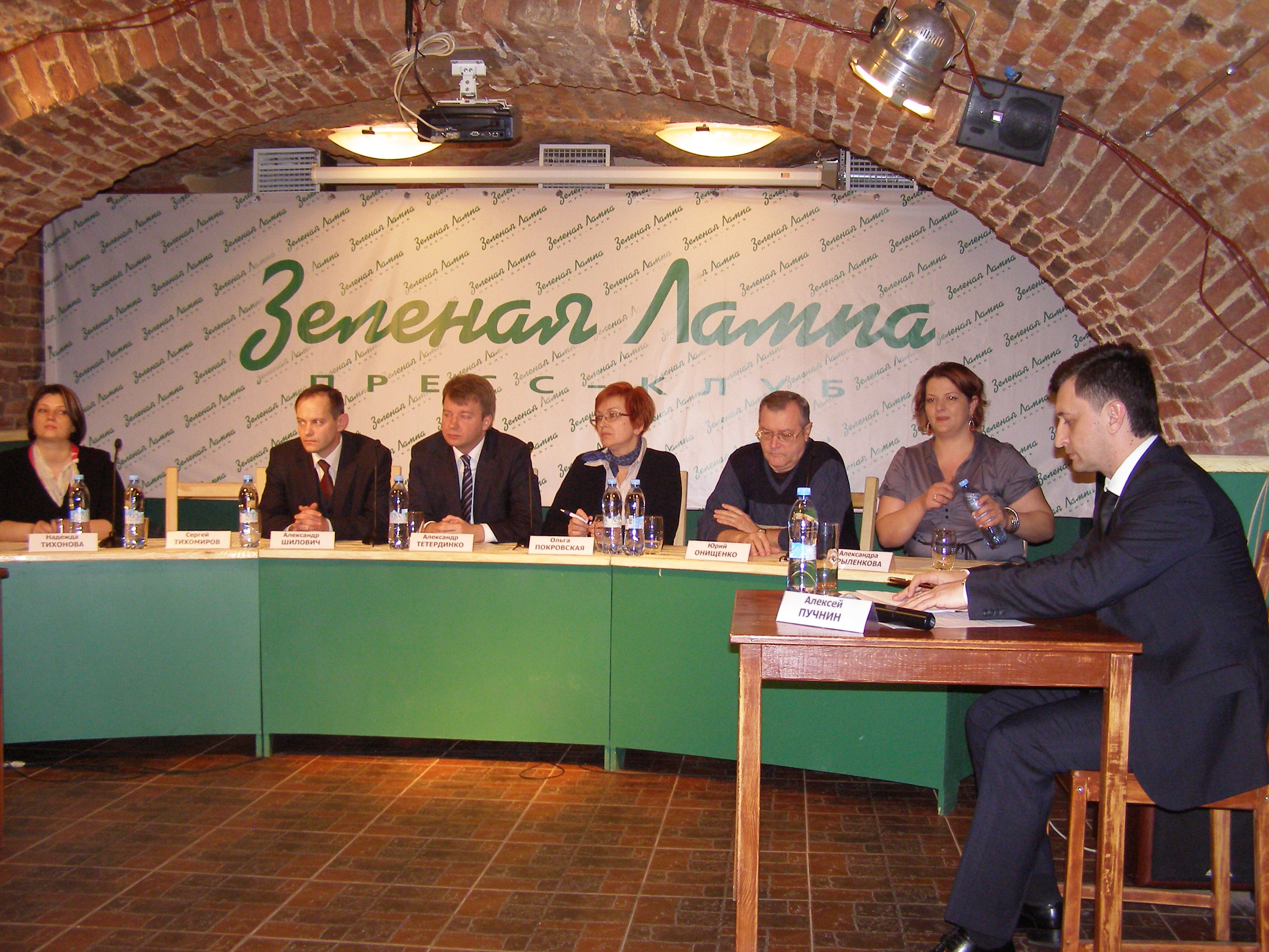 Формирование УИК. Пресс-клуб Зеленая лампа. 15 апреля 2013 года